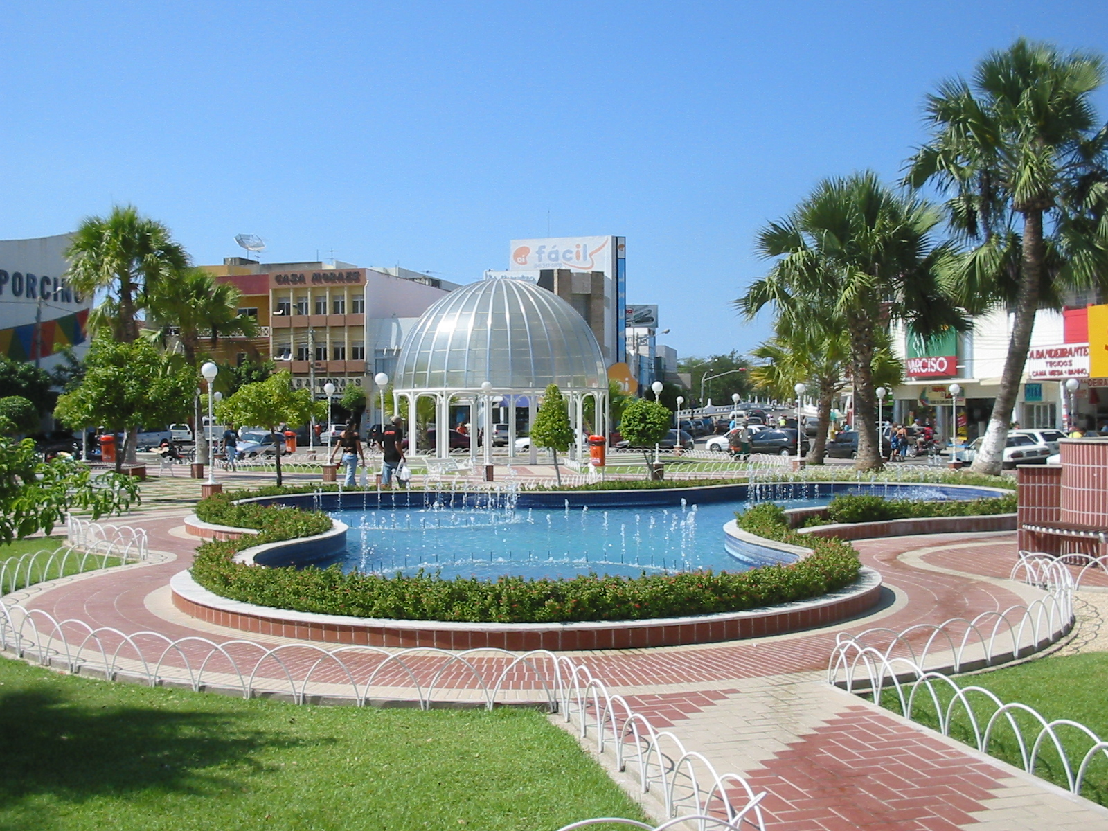 Mossoró (Rio Grande do Norte), Brasil. Praça Rodolfo Fernandes. Rodolfo Fernandes Square. Mossoró (Rio Grande do Norte), Brazil.